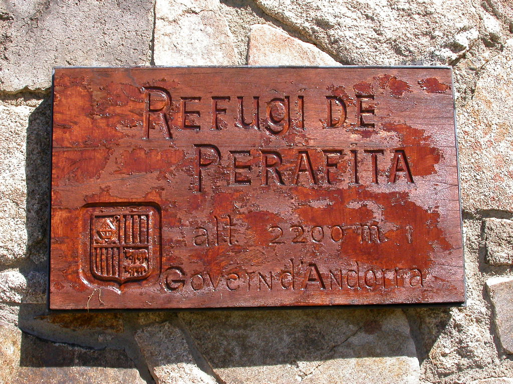 Refuges Andorre